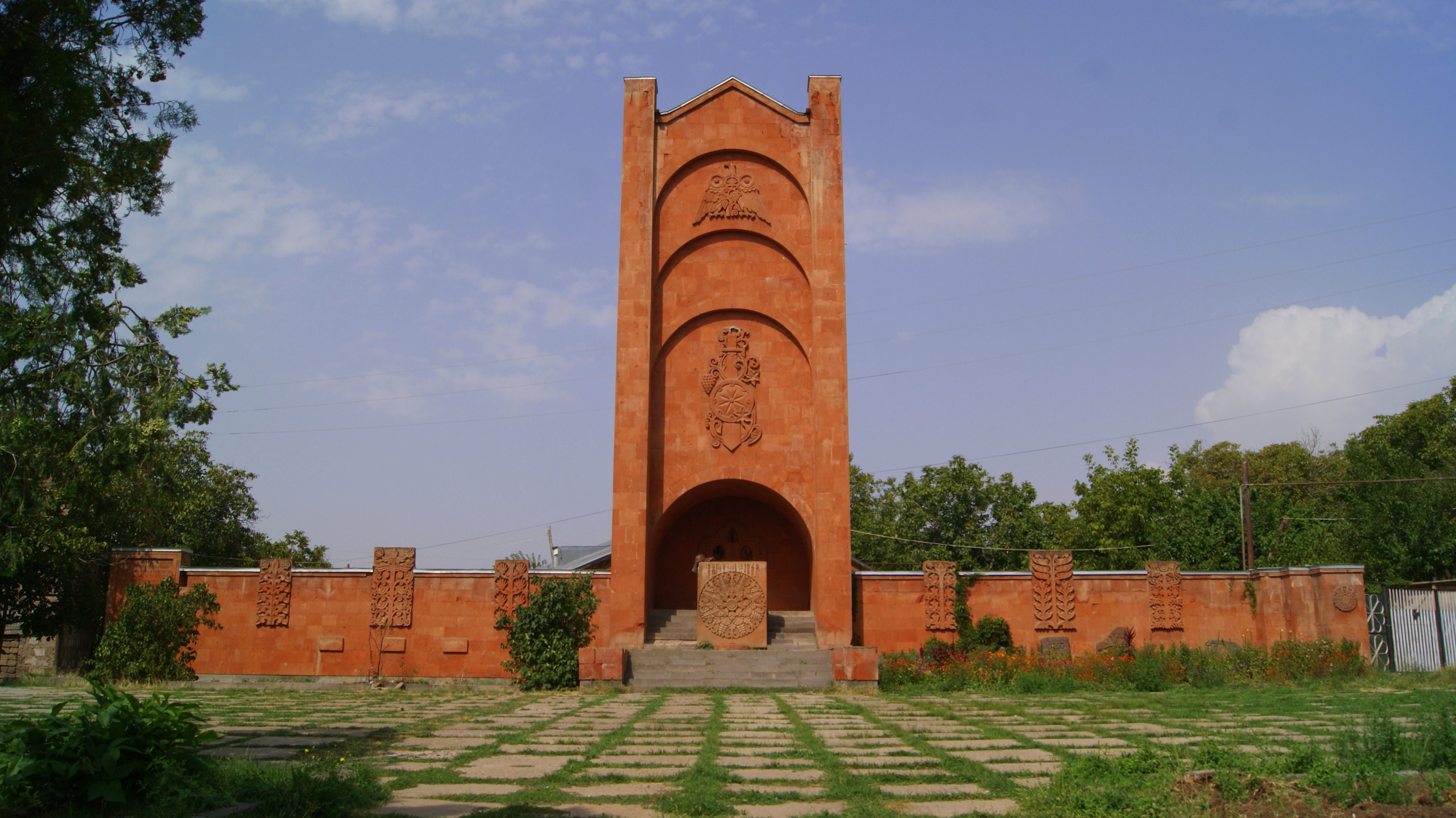 Հուշարձան Երկրորդ աշխարհամարտում զոհվածներին, Կարբի 58/19